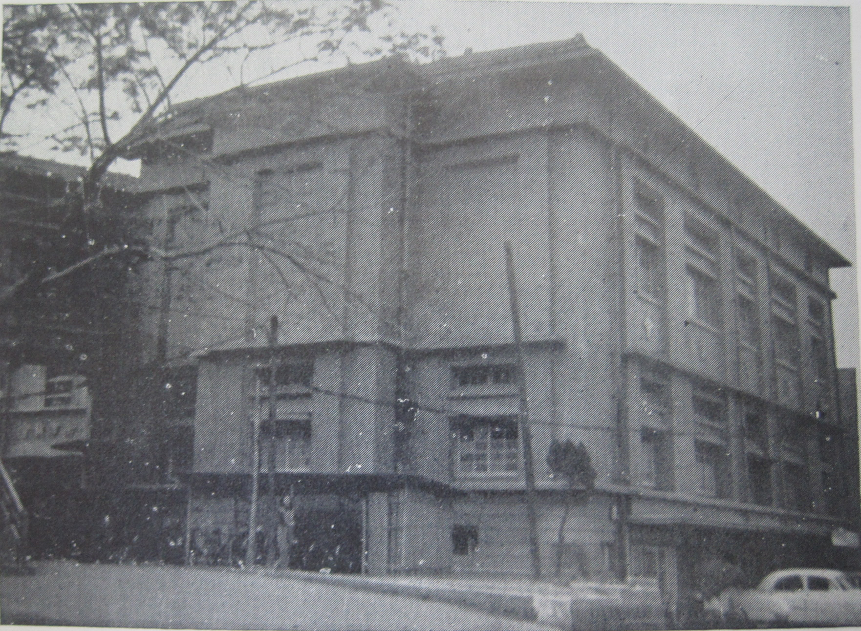 臺南市議會時期的原臺南州會廳舍